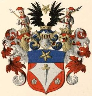 Weissmann von Weissensteini suguvõsa parunivapp